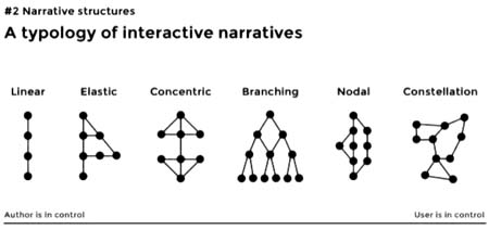 Vari esempi di struttura della storia